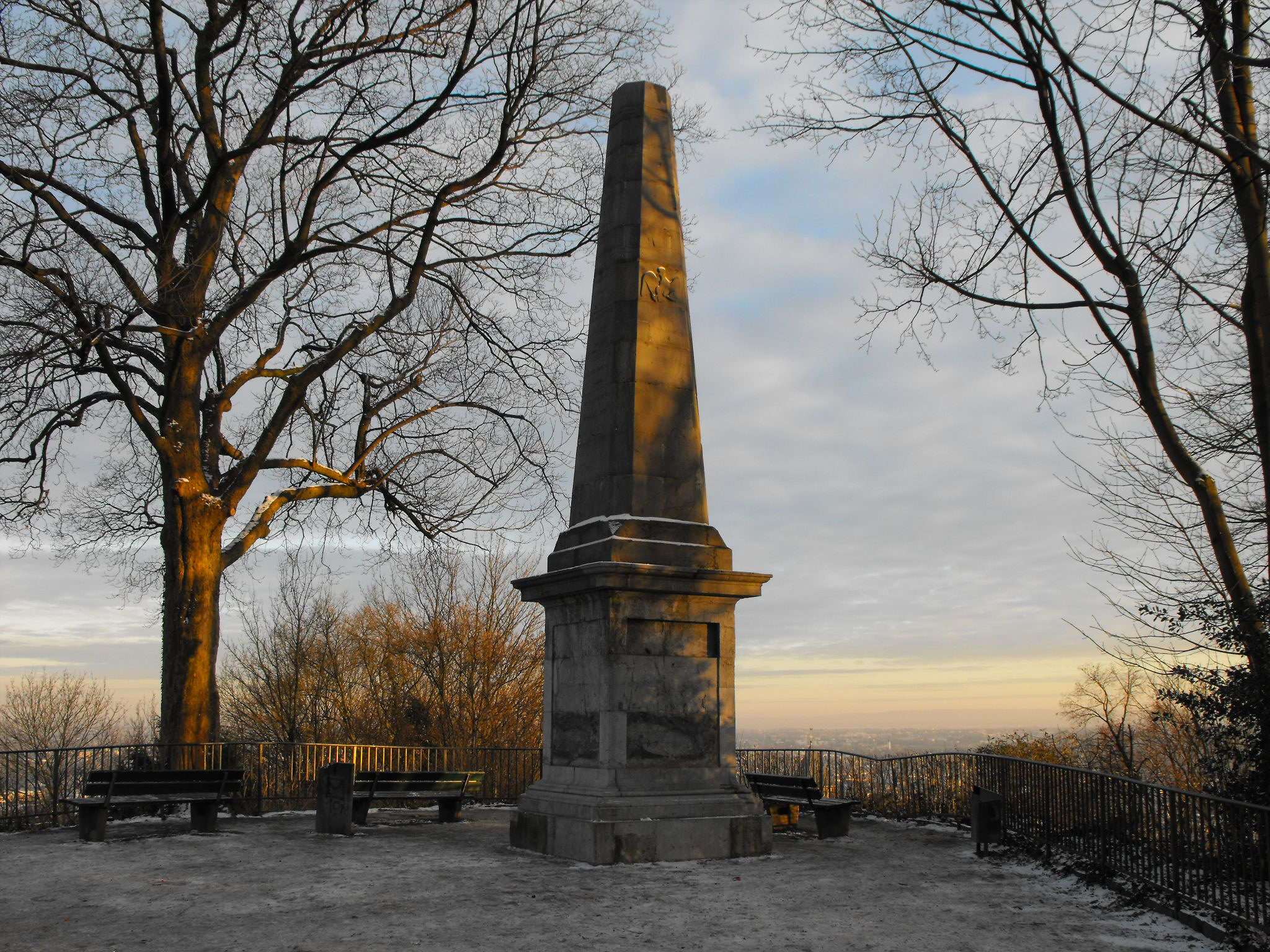 Obelisk auf dem Lousberg, 1807 errichtet zur Erinnerung an den Ausgangspunkt der Landvermessung der Rheinlande durch Tranchot & Müffling